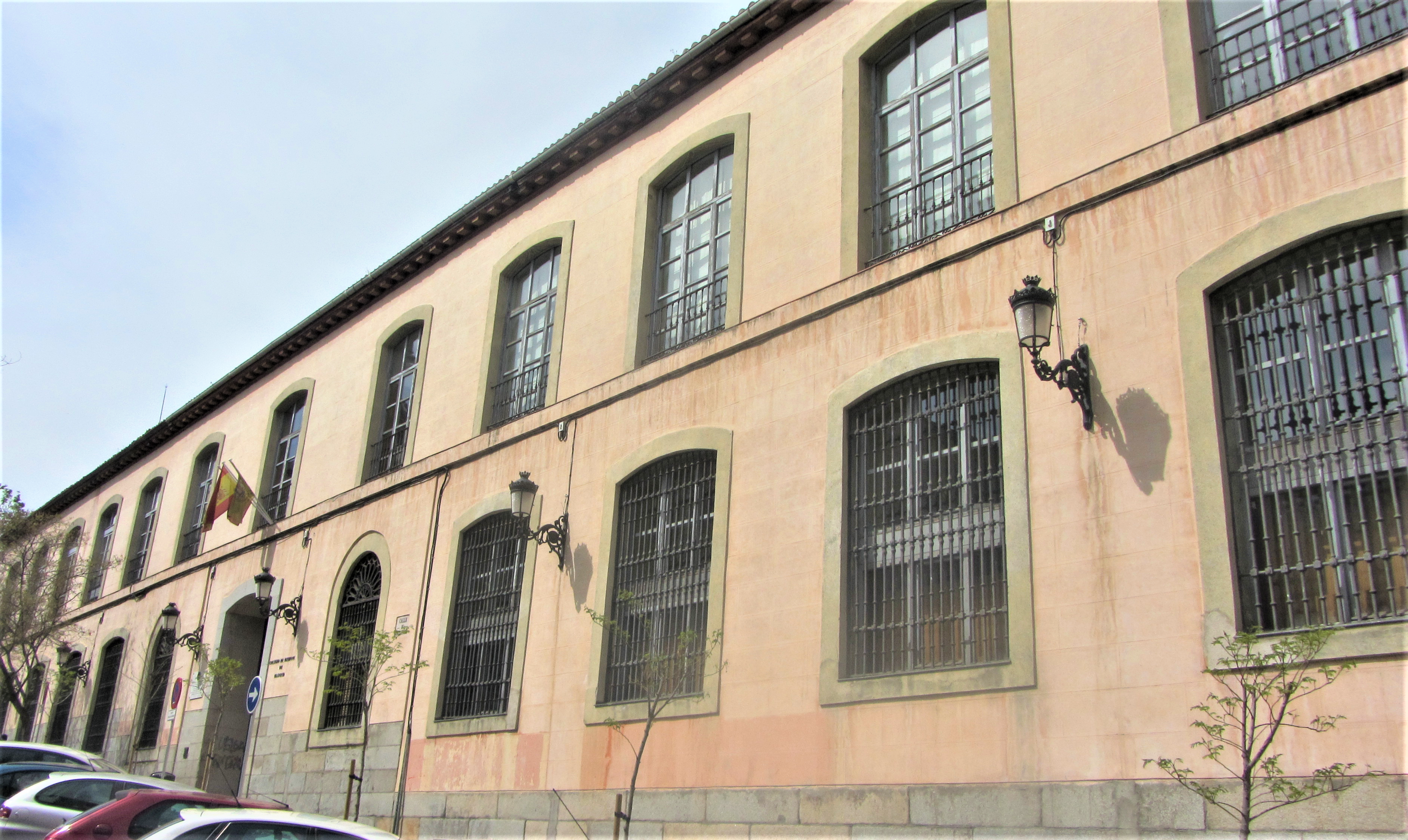 Fachada principal del Ilustre Colegio Oficial de Médicos de Madrid (ICOMEM) en la calle Santa Isabel número 51 de Madrid (Comunidad de Madrid - España).